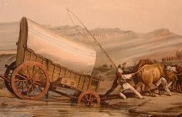 Le Grand Trek des Afrikaners. Le Grand Trek. Chars à bœufs durant le Grand Trek. Le Grand Trek des Boers.